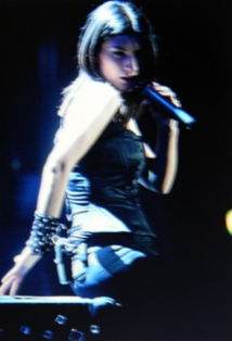 Perfoming "Me Abandono A Te" during the tour.